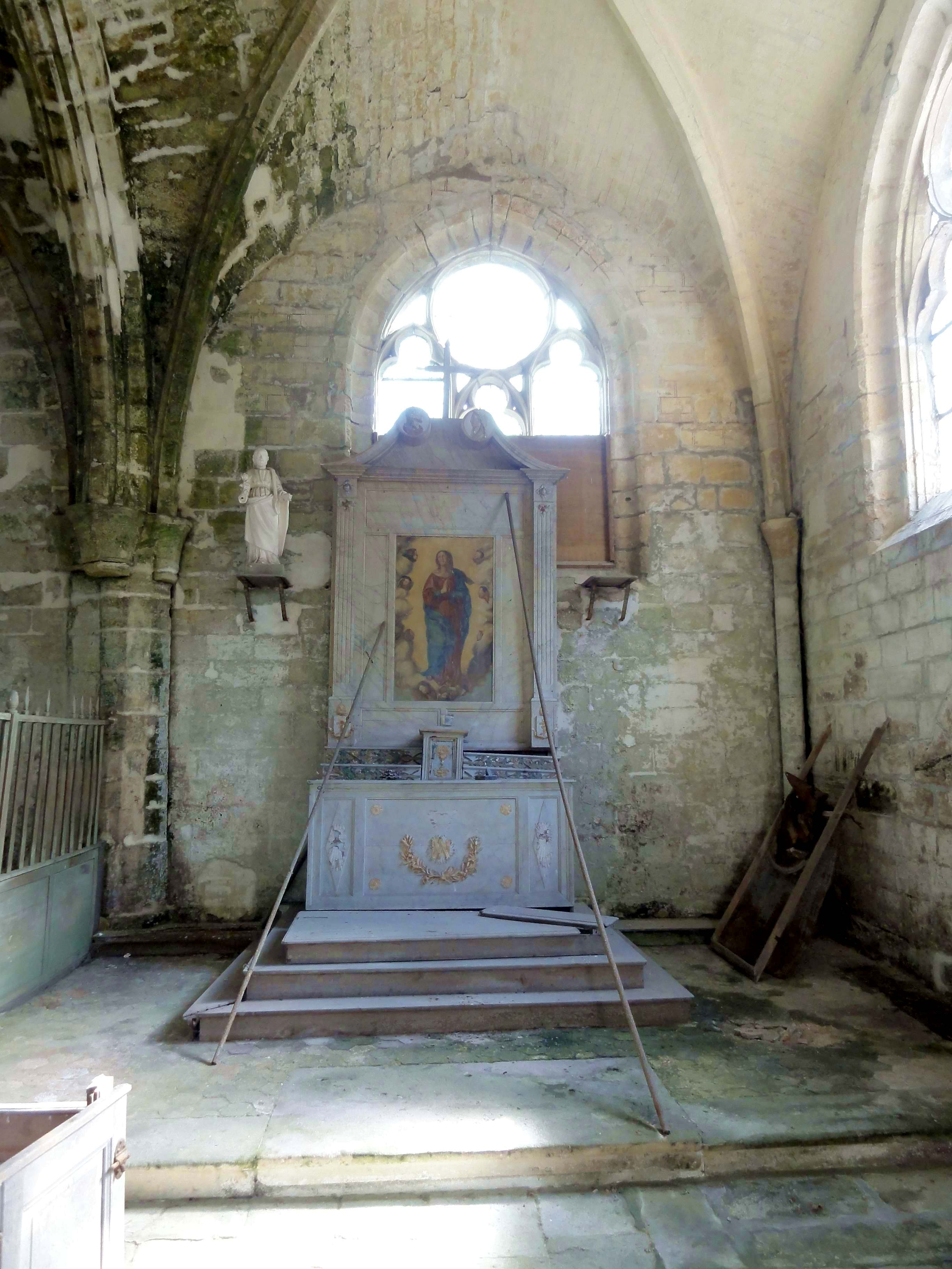 Intérieur de l'église - voir titre.